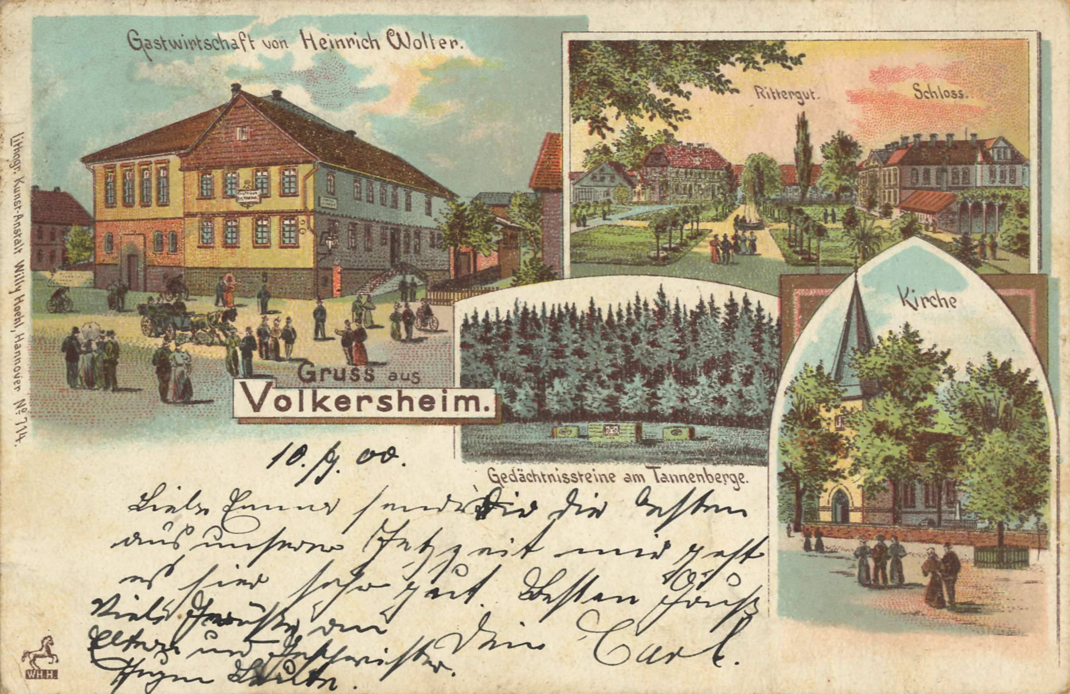 „Gruss aus Volkersheim“ Gastwirtschaft von Heinrich Wolker; Rittergut; Schloss; Kirche; Gedächtnissteine am Tannenberge